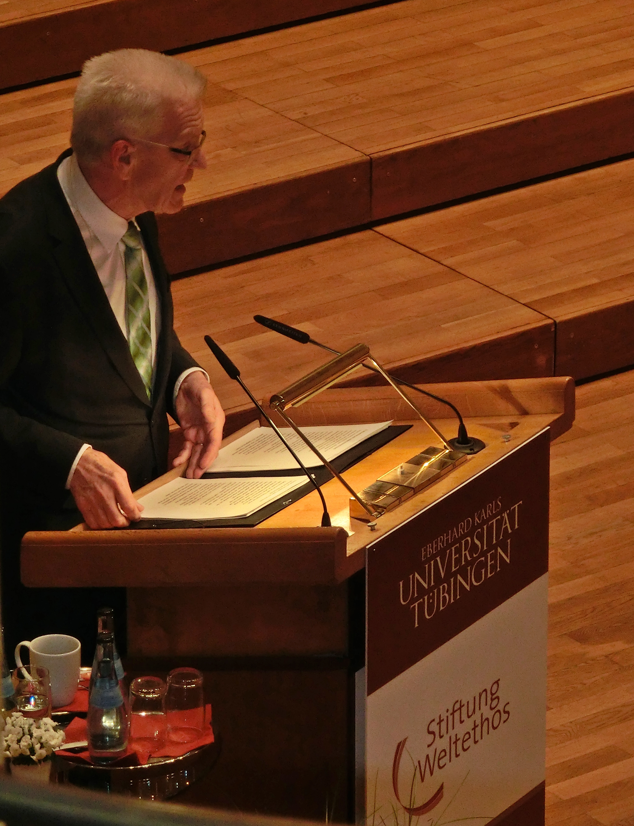 Winfried Kretschmann (* 1948), deutscher Politiker (Grüne) und Ministerpräsident von Baden-Württemberg, bei seiner Weltethos-Rede zum Thema „Zusammenhalt in Zeiten des Umbruchs“ an der Eberhard Karls Universität Tübingen.